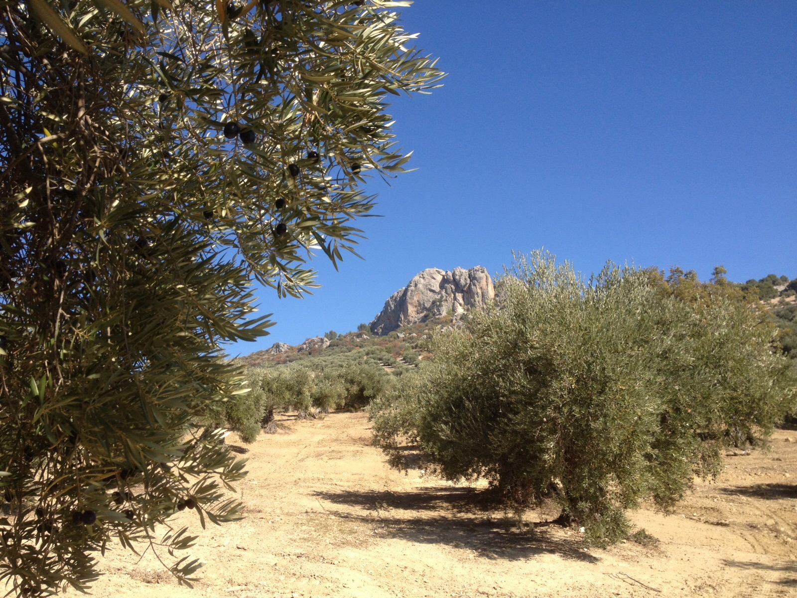 Маслинови насаждения в покрайнините на Хаен